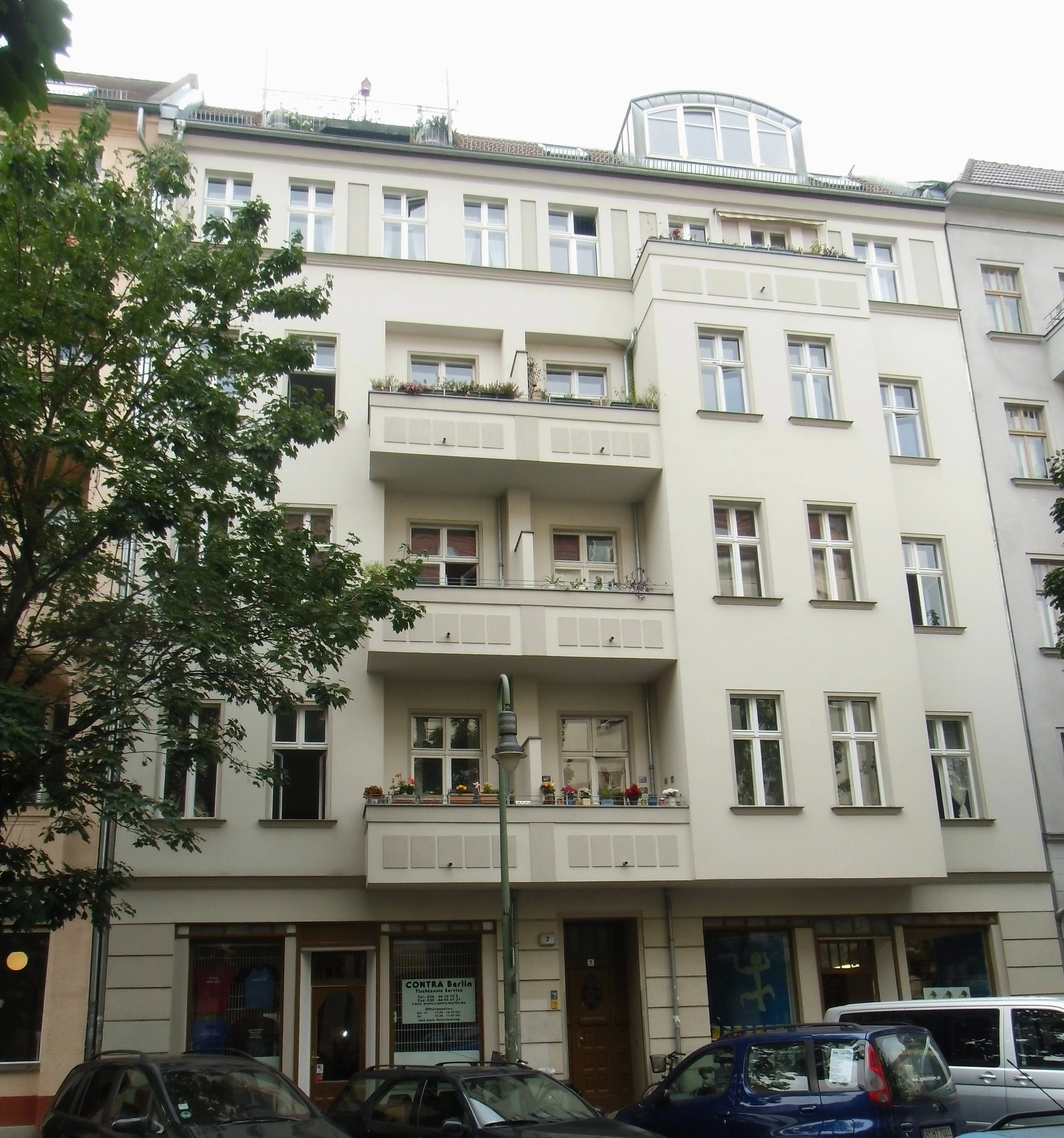 Wohnhaus im denkmalgeschützten Ensemble Göhrener Straße, erbaut 1910-1911